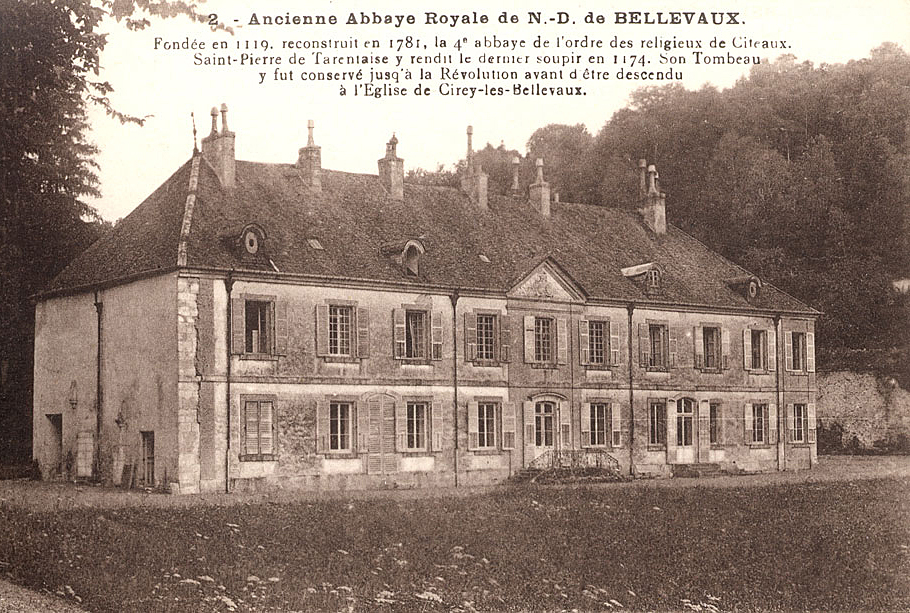 Ancienne Abbaye Royale N.-D. de Bellevaux